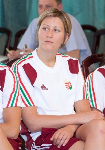 Anita Bulath